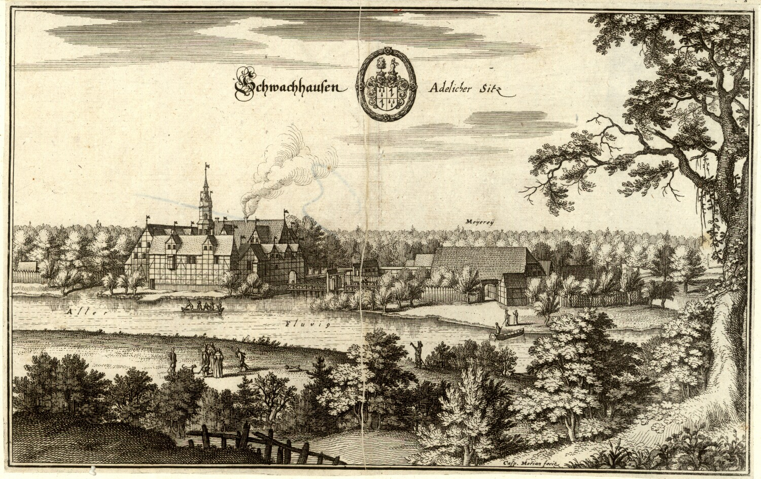 Schwachhausen Adelicher Sitz Autor: Merian, Caspar, 1627-1686 Verlagsangaben: [Frankfurt a. Main : Casp. Merian, 1654]